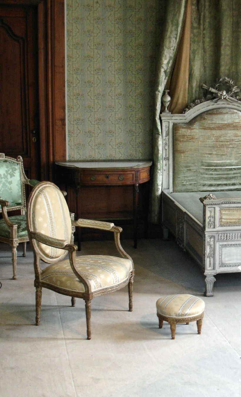 Fauteuil à la reine louis-seize, à médaillon, tabouret repose-pied, Design Museum à Gent (Gand-Belgique)